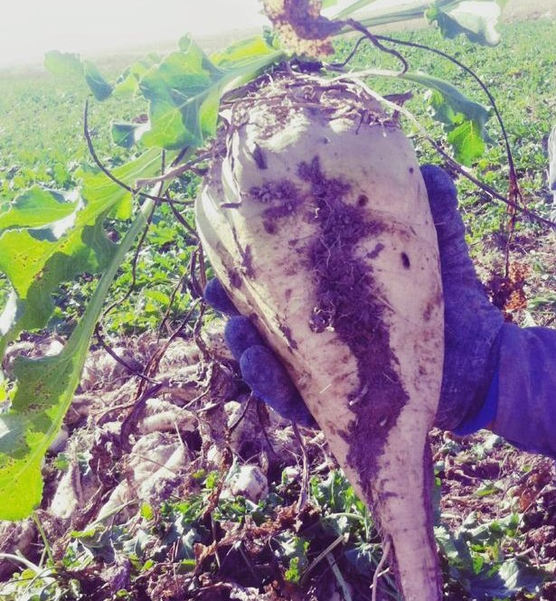 Köyde yetişen bir bitki olan şeker pancarı.